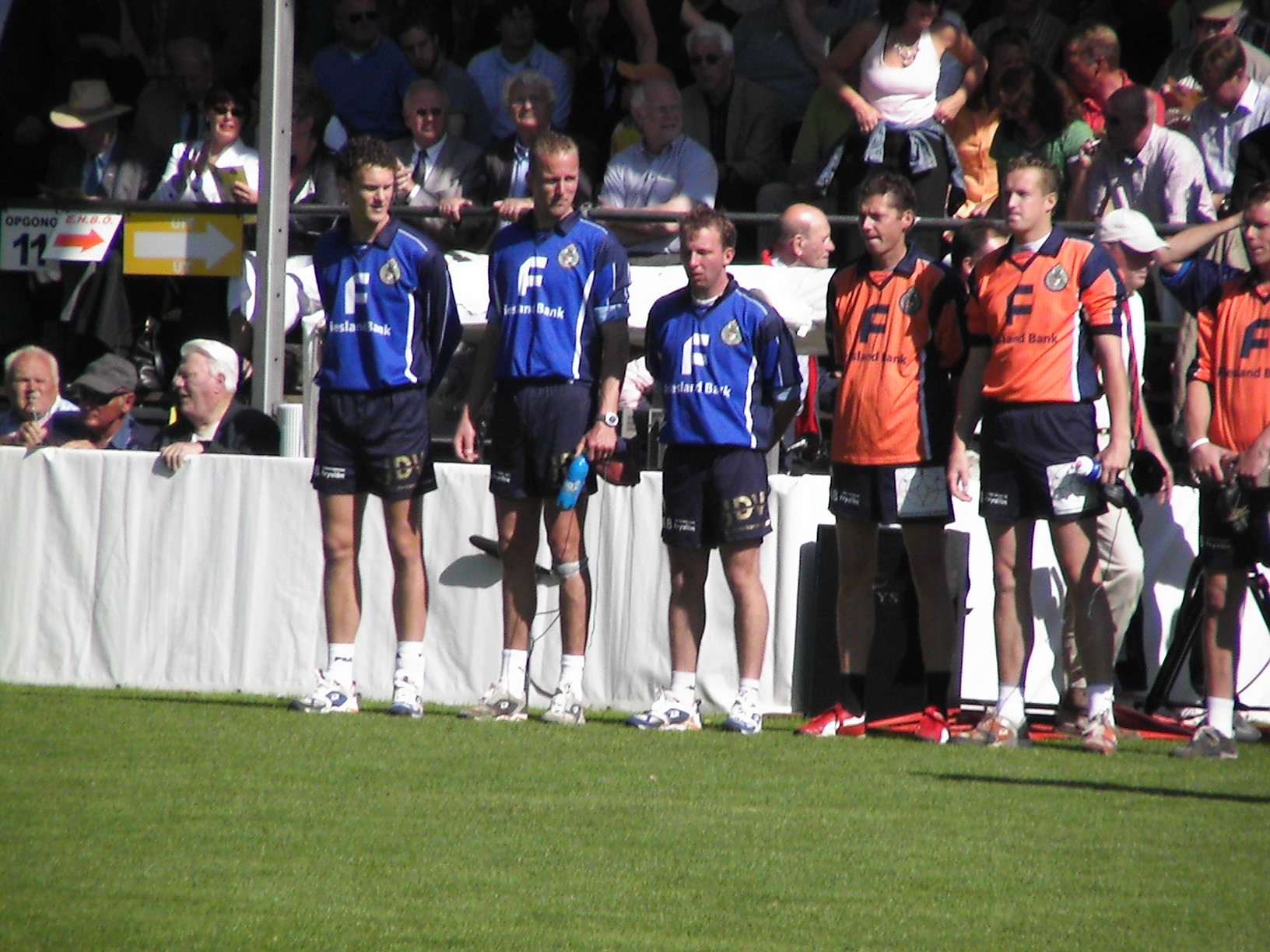 PC 2007 partoer 8